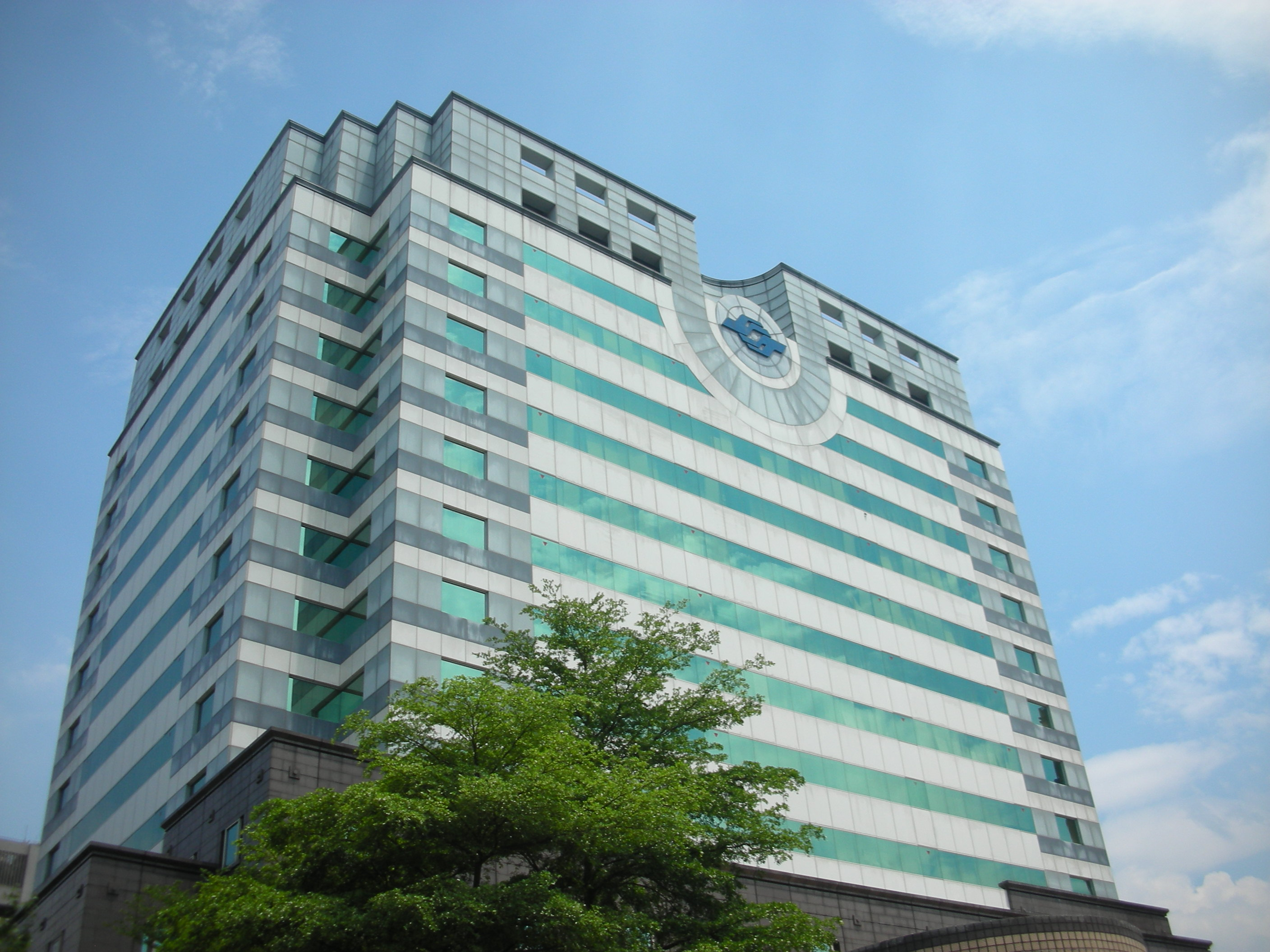 中文（台灣）: 捷運行政大樓。